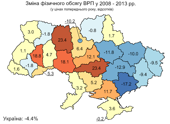 Зміна фізичного обсягу валового регіонального продукту (у цінах попередніх років) за 2008-2013 рр./ Change in gross regional product in Ukraine - 2008-2013